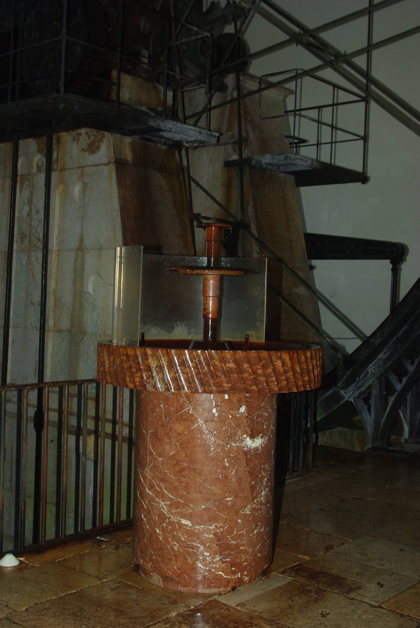 Alte Saline in 83435 Bad Reichenhall, Maschinenhalle im Hauptbrunnhaus; Solebrunnen von Anton Hiller This is a photograph of an architectural monument.